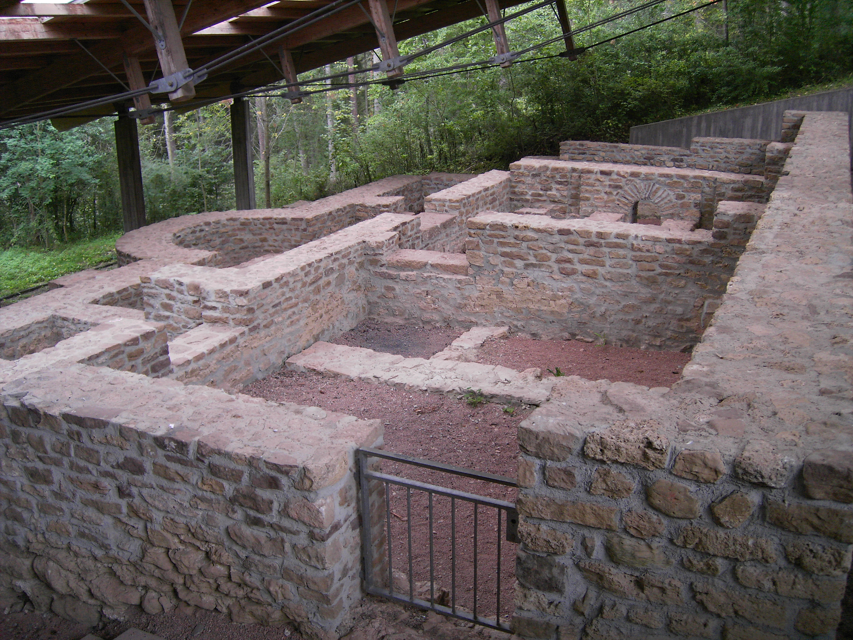 roman bath in Fischbach Baden-Württemberg Deutschland